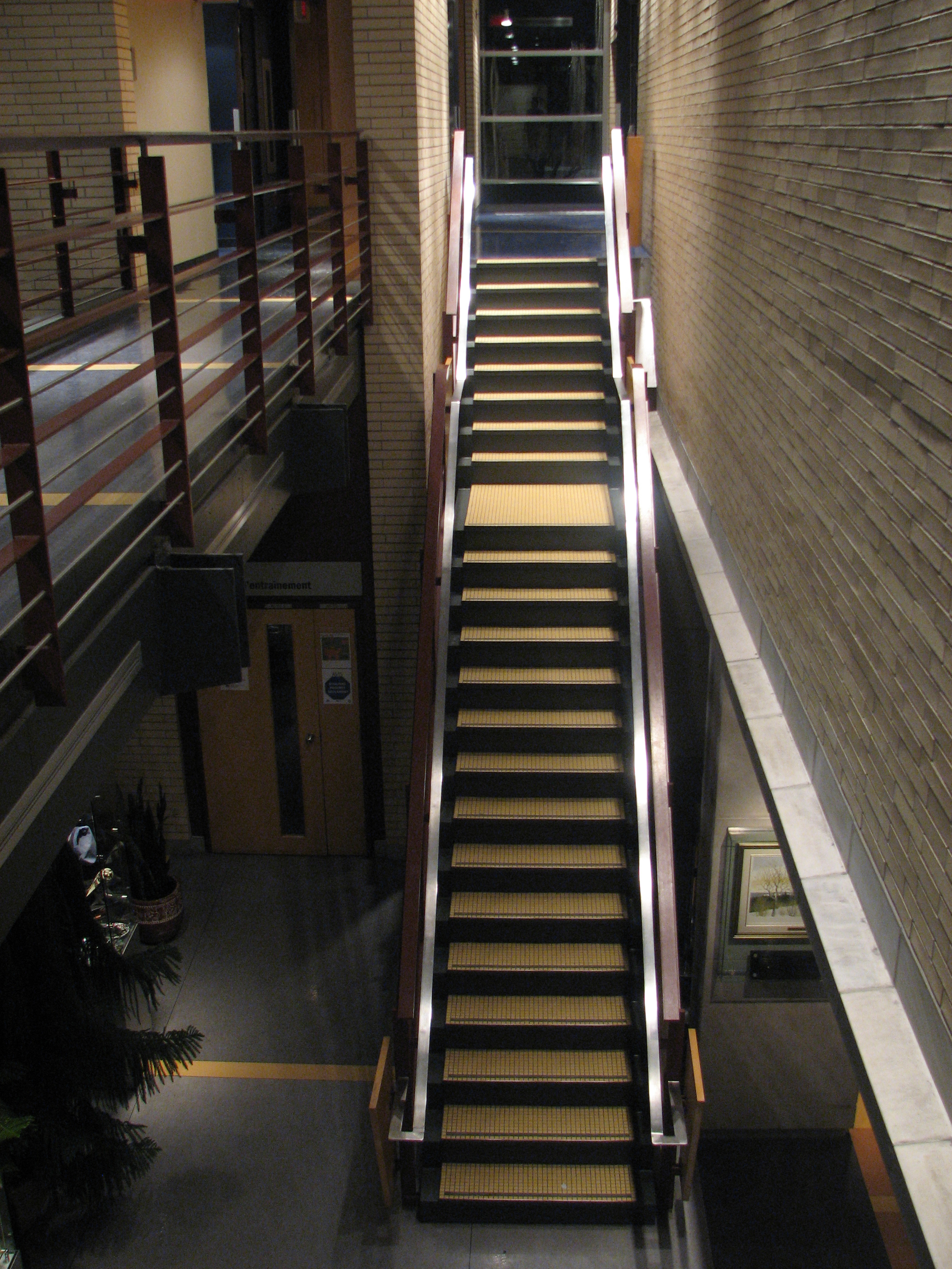 Intérieur du Collège privé Regina Assumpta à Montréal